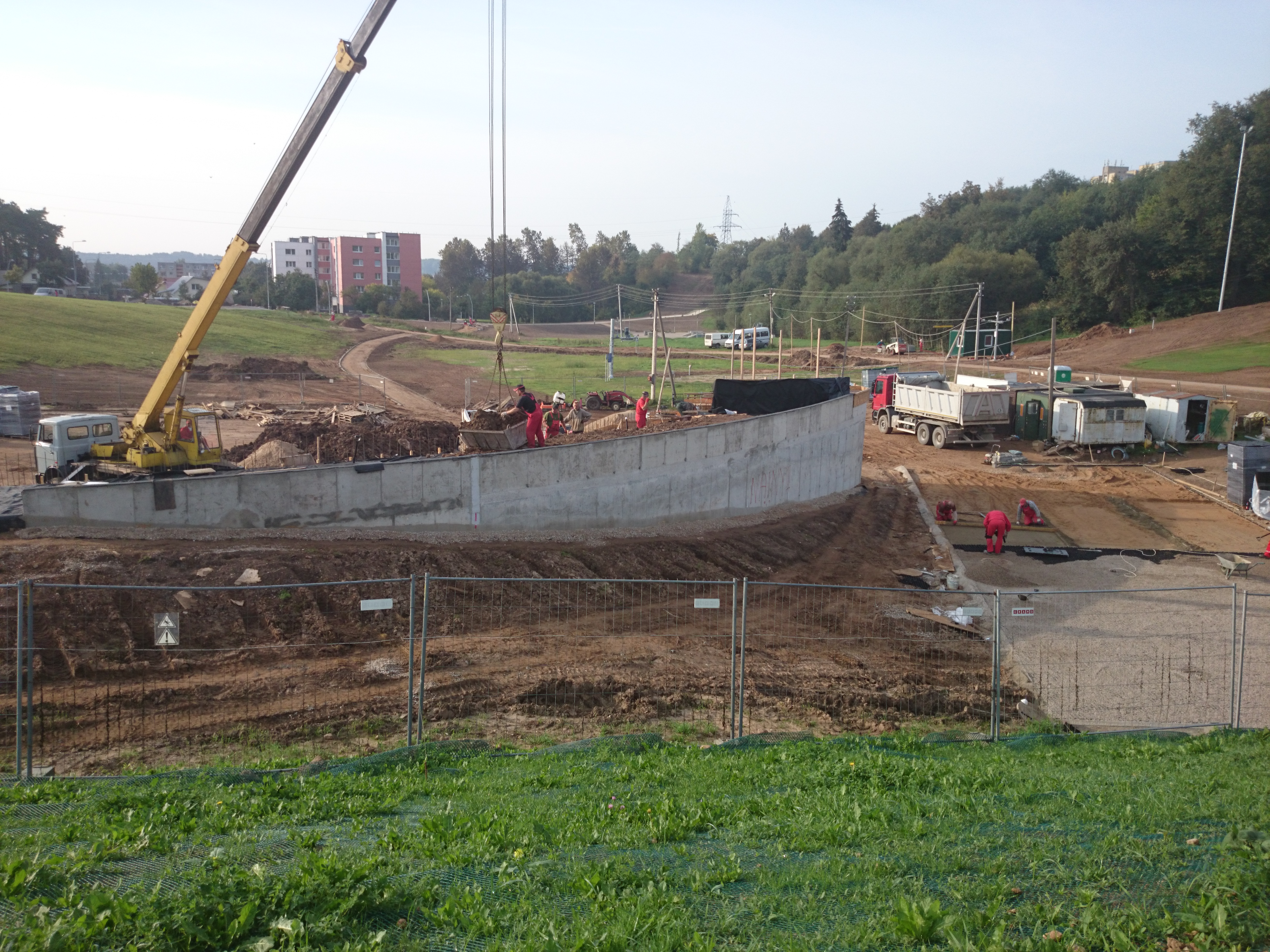 Joninių slėnis